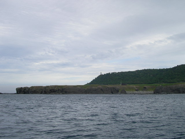 SHIRETOKO cape